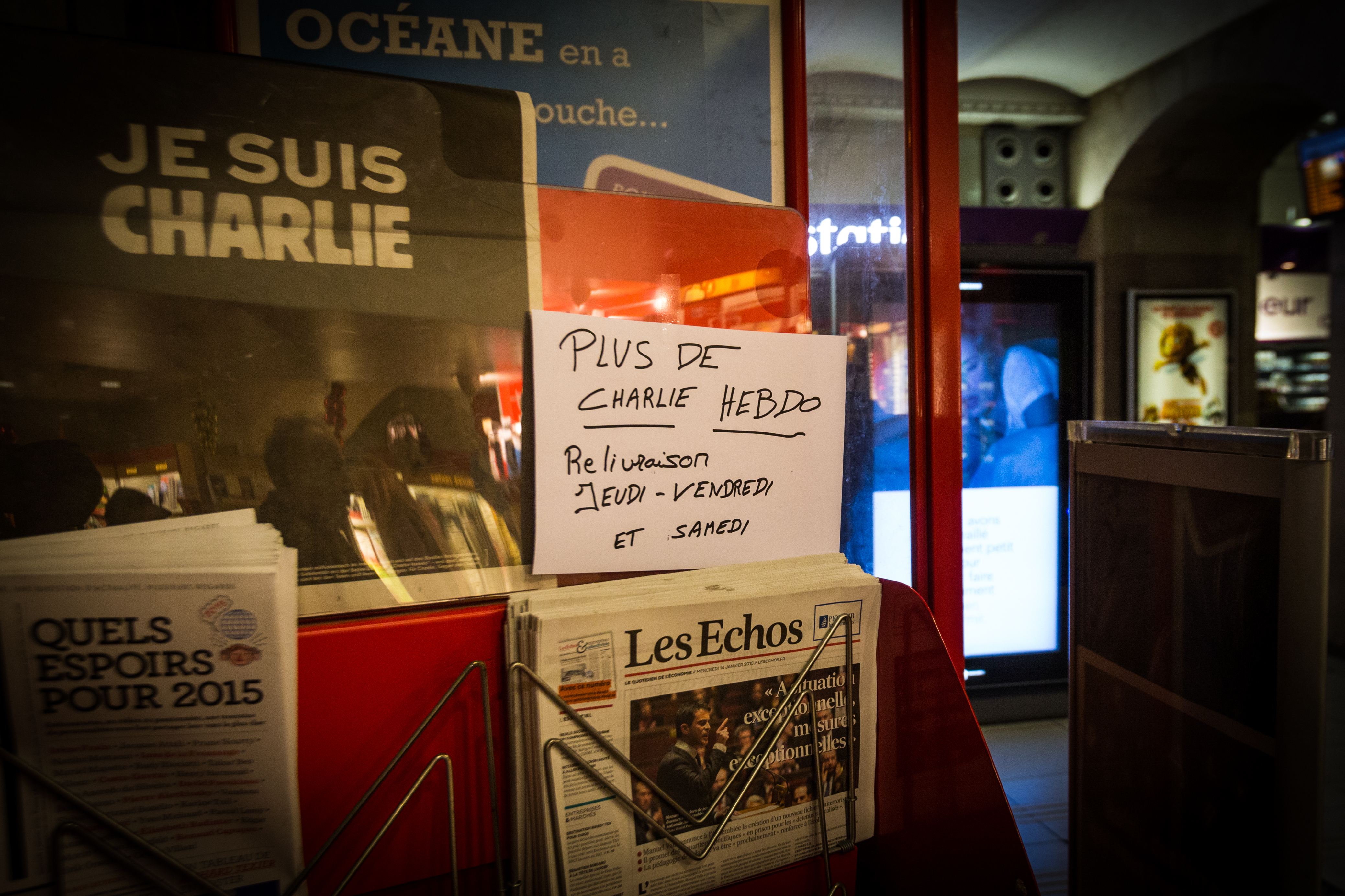 Les 112 exemplaires mis en place au kiosque « Relay » en gare de Strasbourg étaient vendus dès 6h du matin le mercredi 14 janvier 2015.